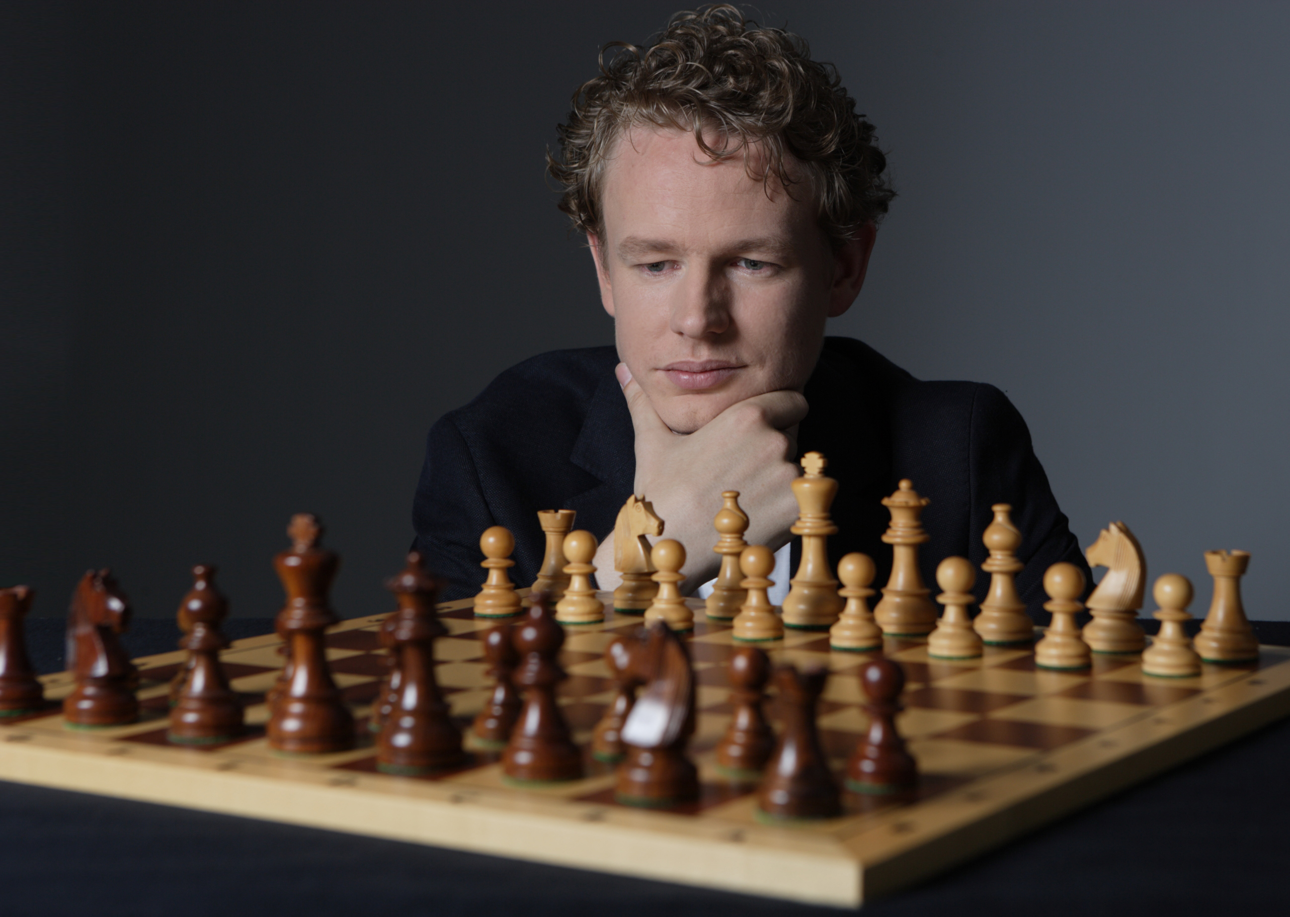 Jan Gustafsson 2010